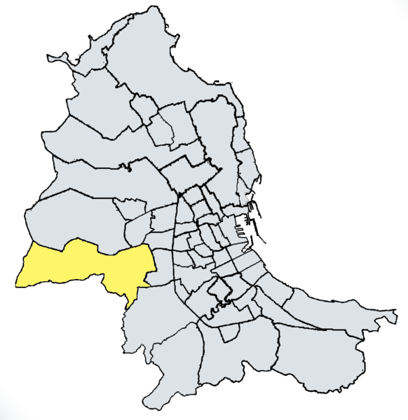 Boccadifalco-Baida